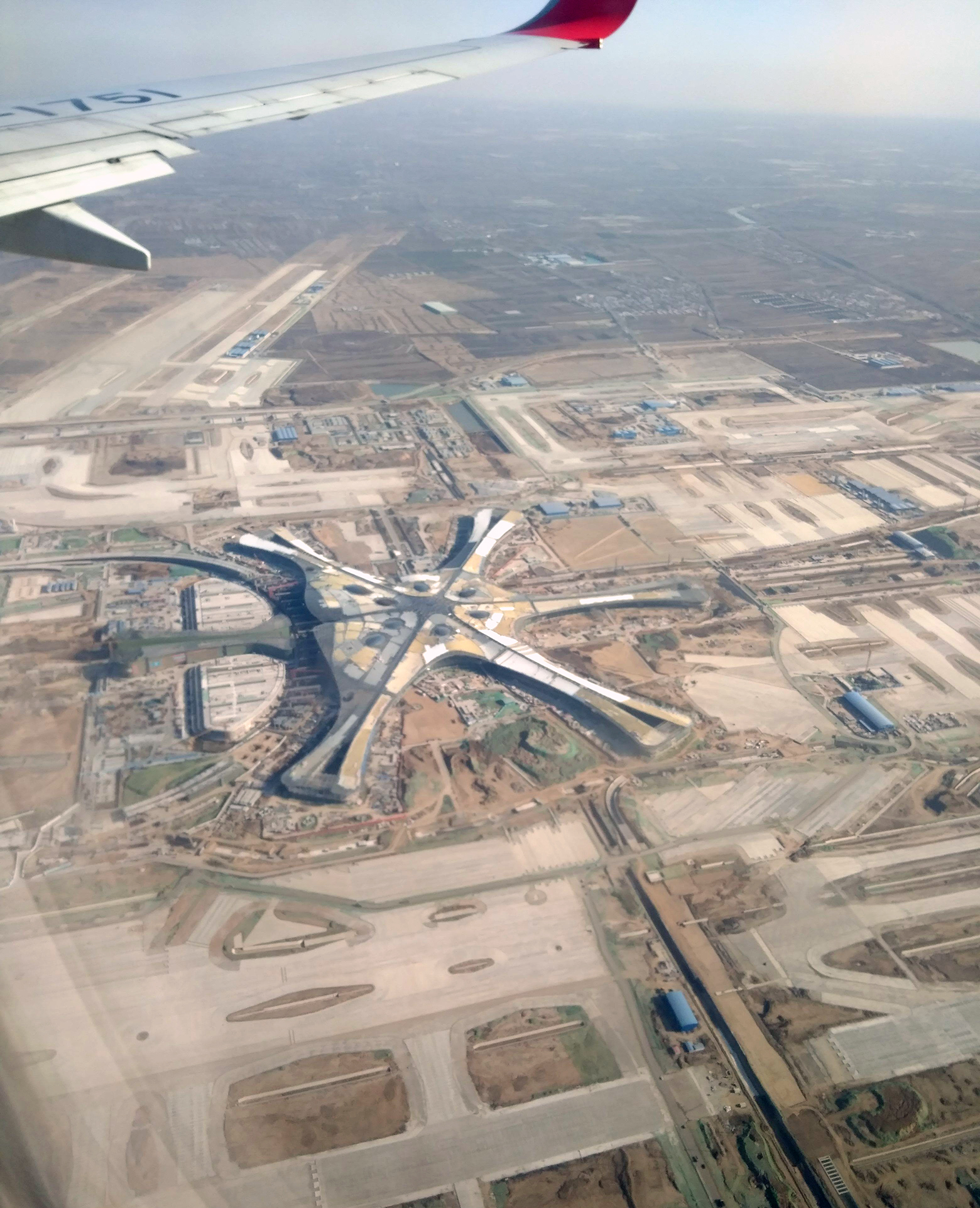 аэропорт Пекин Дасин из окна самолета